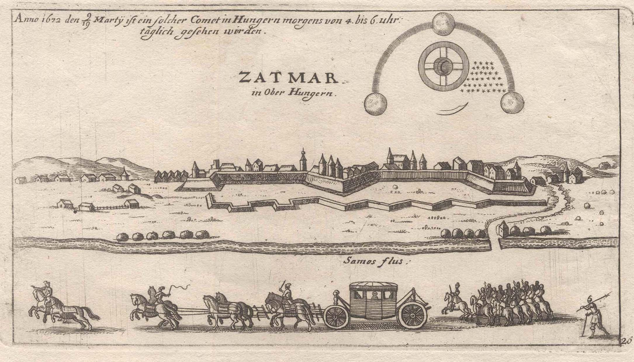 Szatmár vára 1662-ben, egy üstökös ábrázolásával